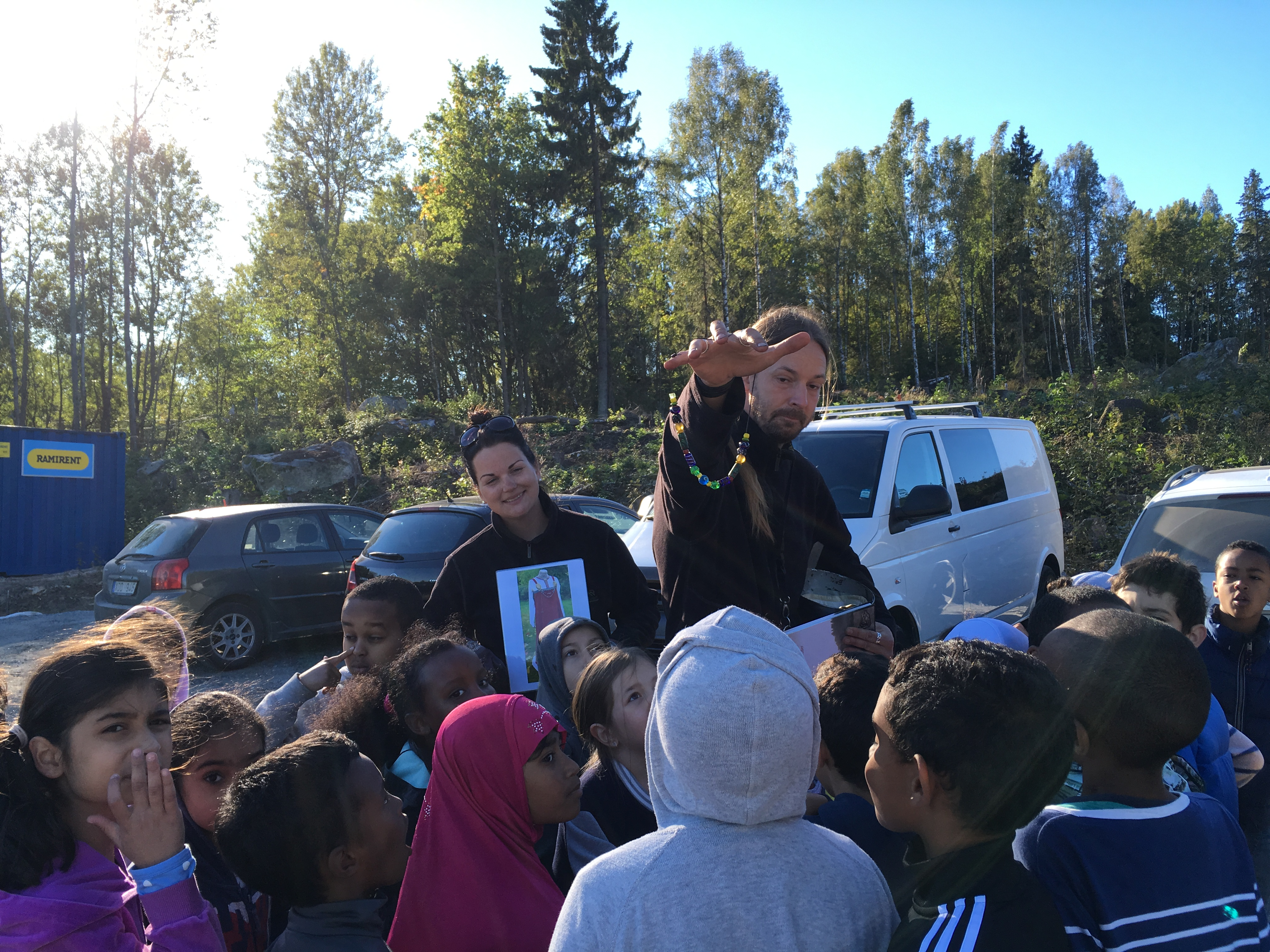 Hjulsta grundskola arbetade med projektet Välkommen till min plats där eleverna besökte en utgrävning nära Hjulsta.